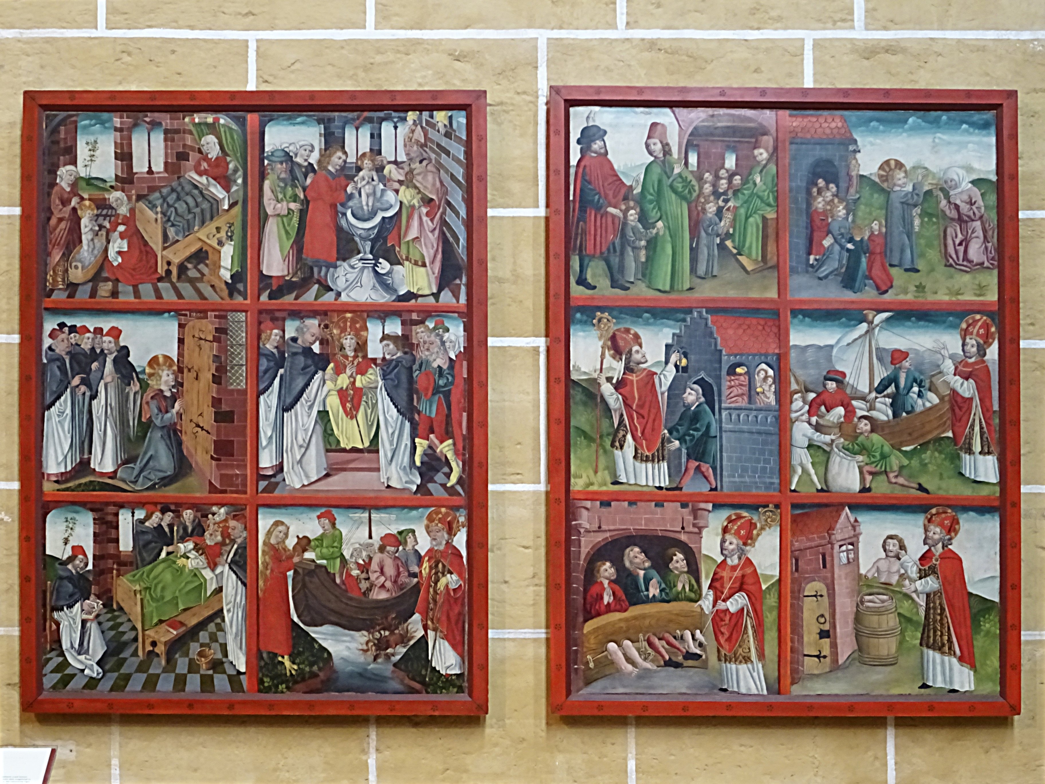 Nikolausaltar aus Thüringen (1485) in der Marienkirche (Mühlhausen). Die beiden erhaltenen Flügel schildern zwölf Szenen aus dem Leben des Heiligen.